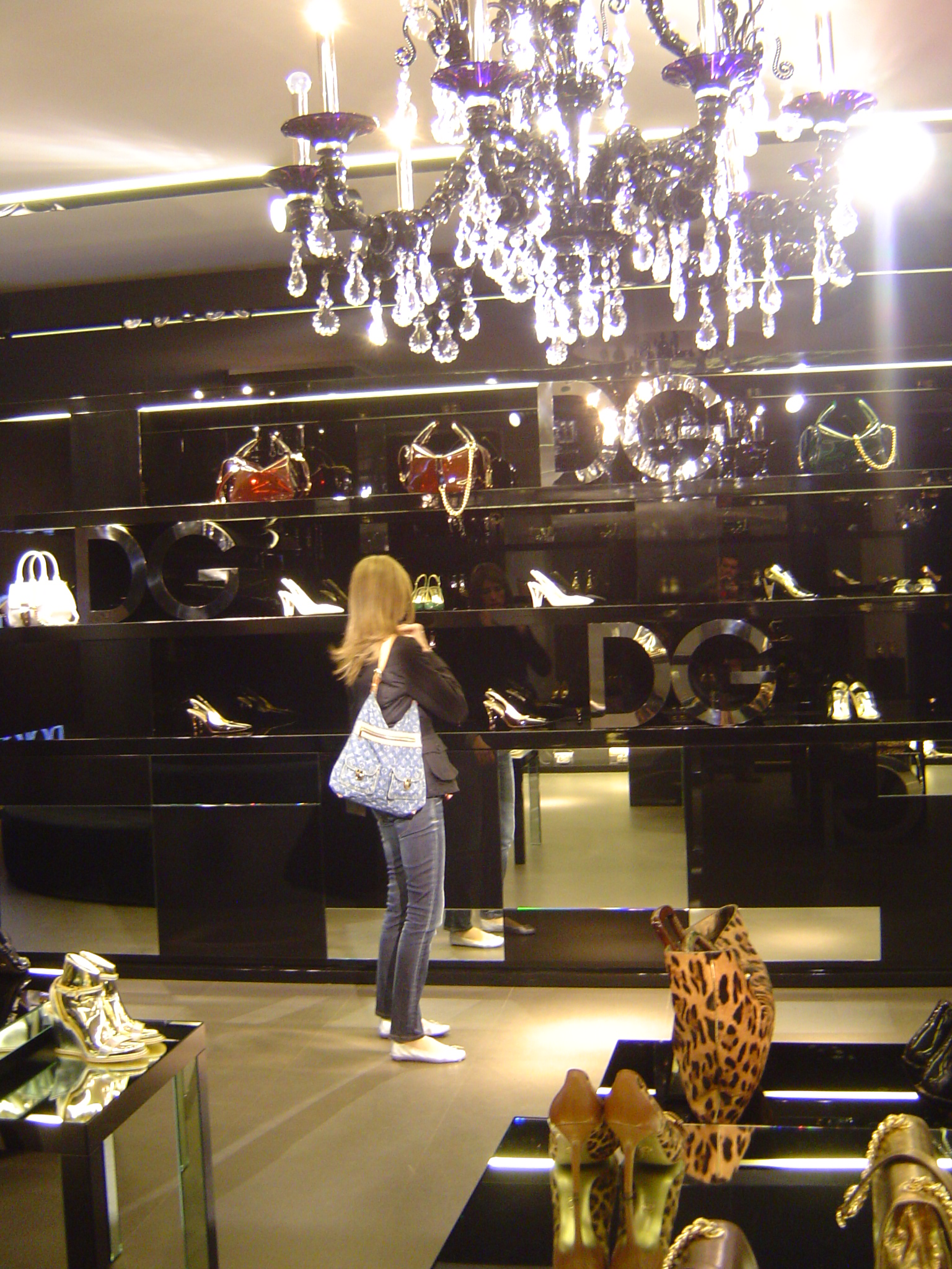 The Dolce & Gabbana shop in Via della Spiga, Milan